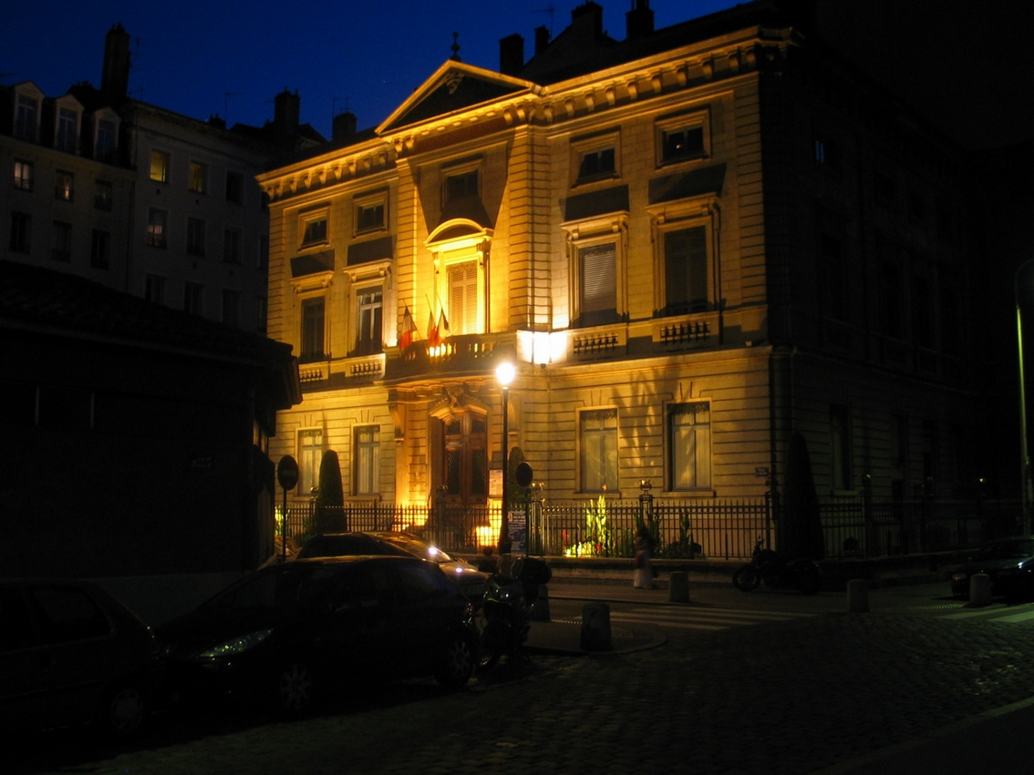 Mairie du 2e arrondissement de Lyon